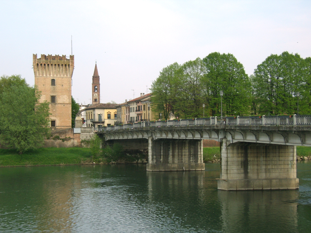 Vista di Pizzighettone (CR), con il ponte sul fiume Adda, la torre e il campanile della chiesa di San Bassiano